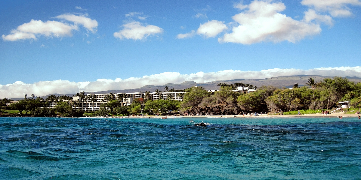 Иллюстрация Второва И.П. для учебника Гавайеведение.